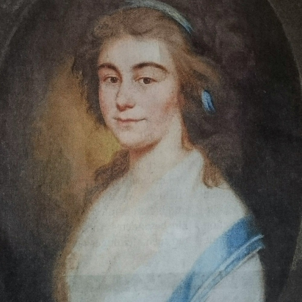 Christophine Reinwald, geborene Schiller (1757–1847), älteste Schwester von Friedrich Schiller.